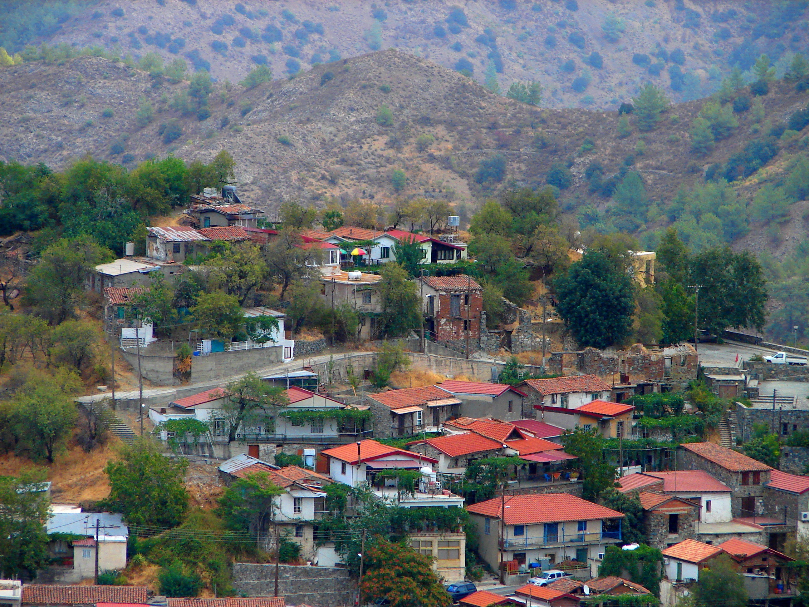 a@a Palechori village Nicosia Cyprus